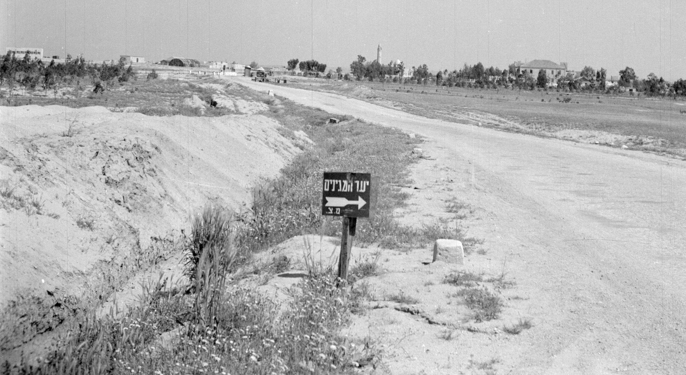 Weg leidend naar een controlepost in de Negevwoestijn, met op de achtergrond een dorp, vermoedelijk Beersjewa. Reportage / Serie: Israël 1948-1949: Negevwoestijn, controlepost.